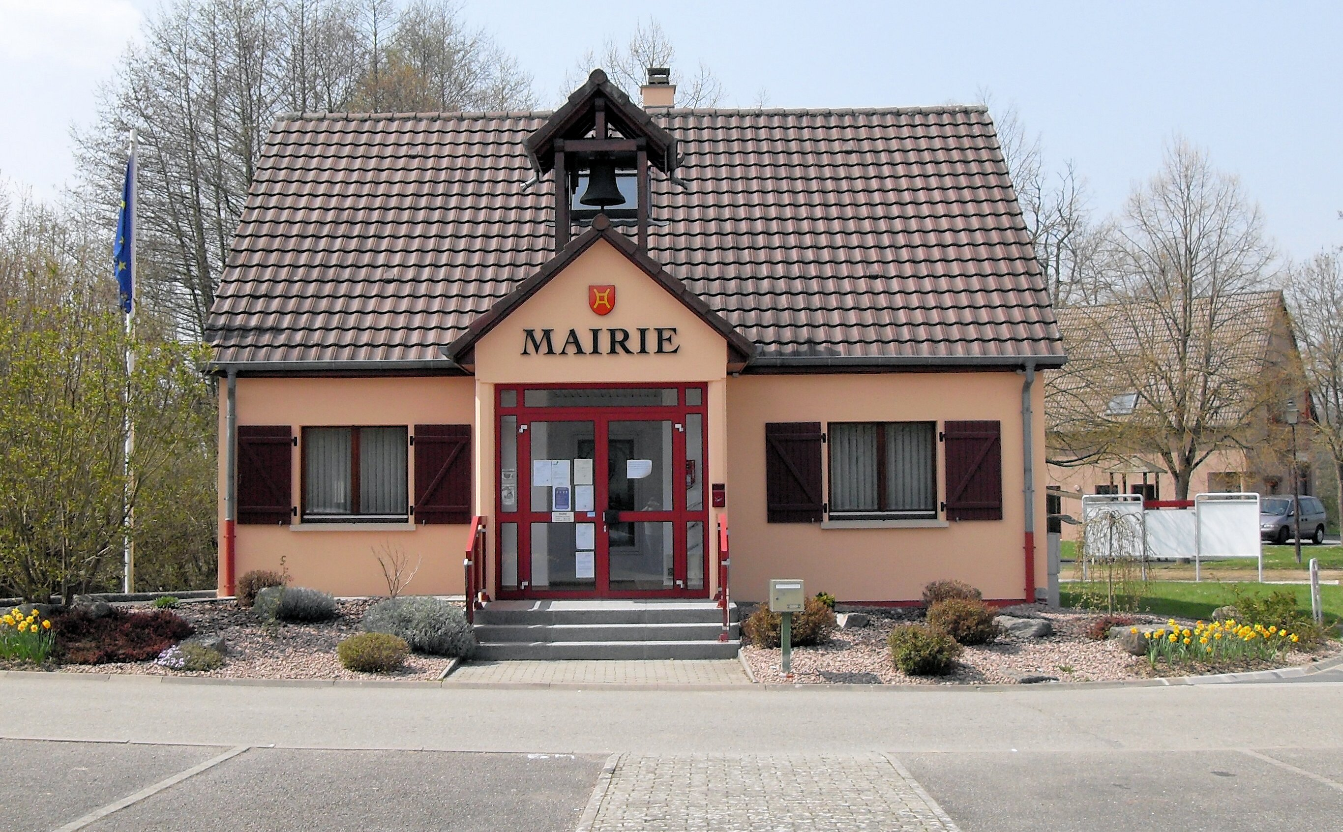 La mairie de Schwoben